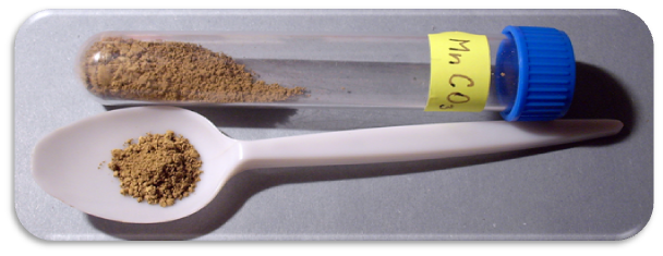 Uhličitan manganatý - MnCO3